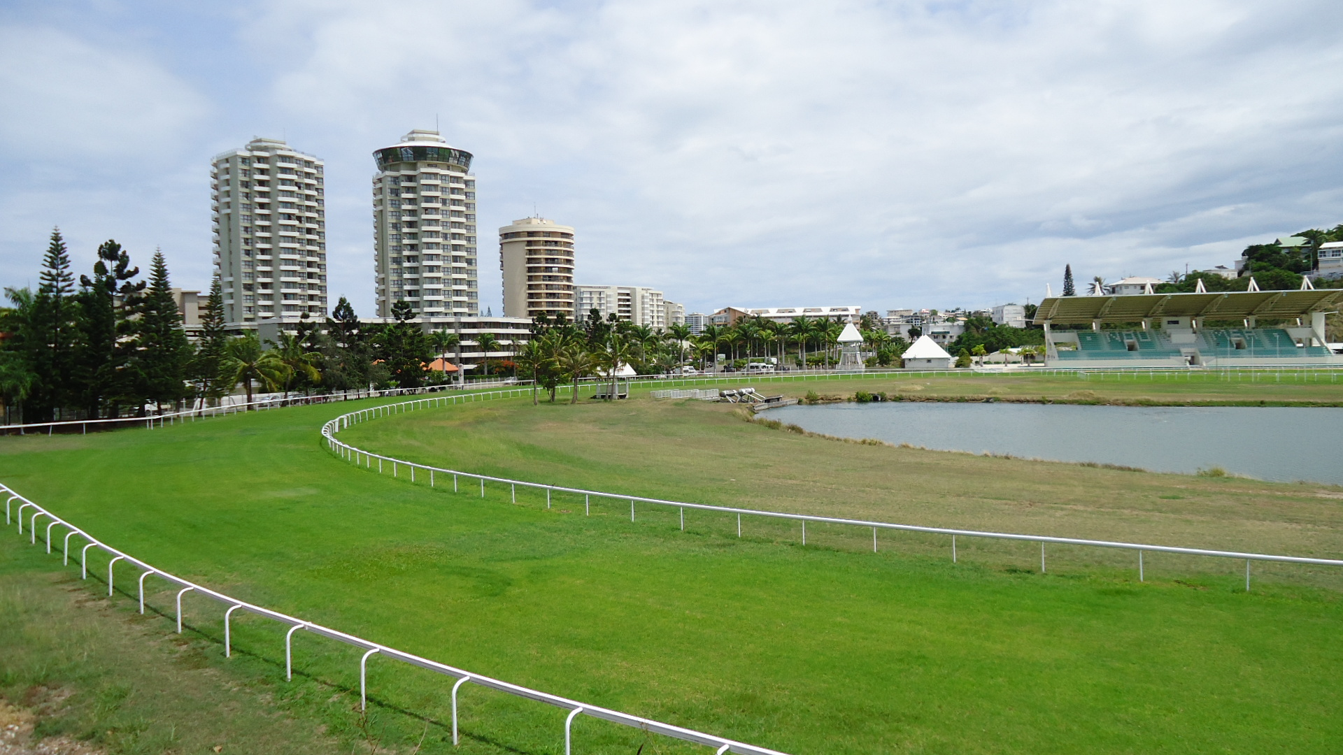 Piste de l'hippodrome Henry Milliard